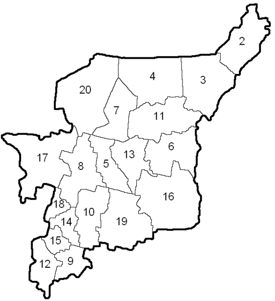 Административно-территориальное деление республики Коми